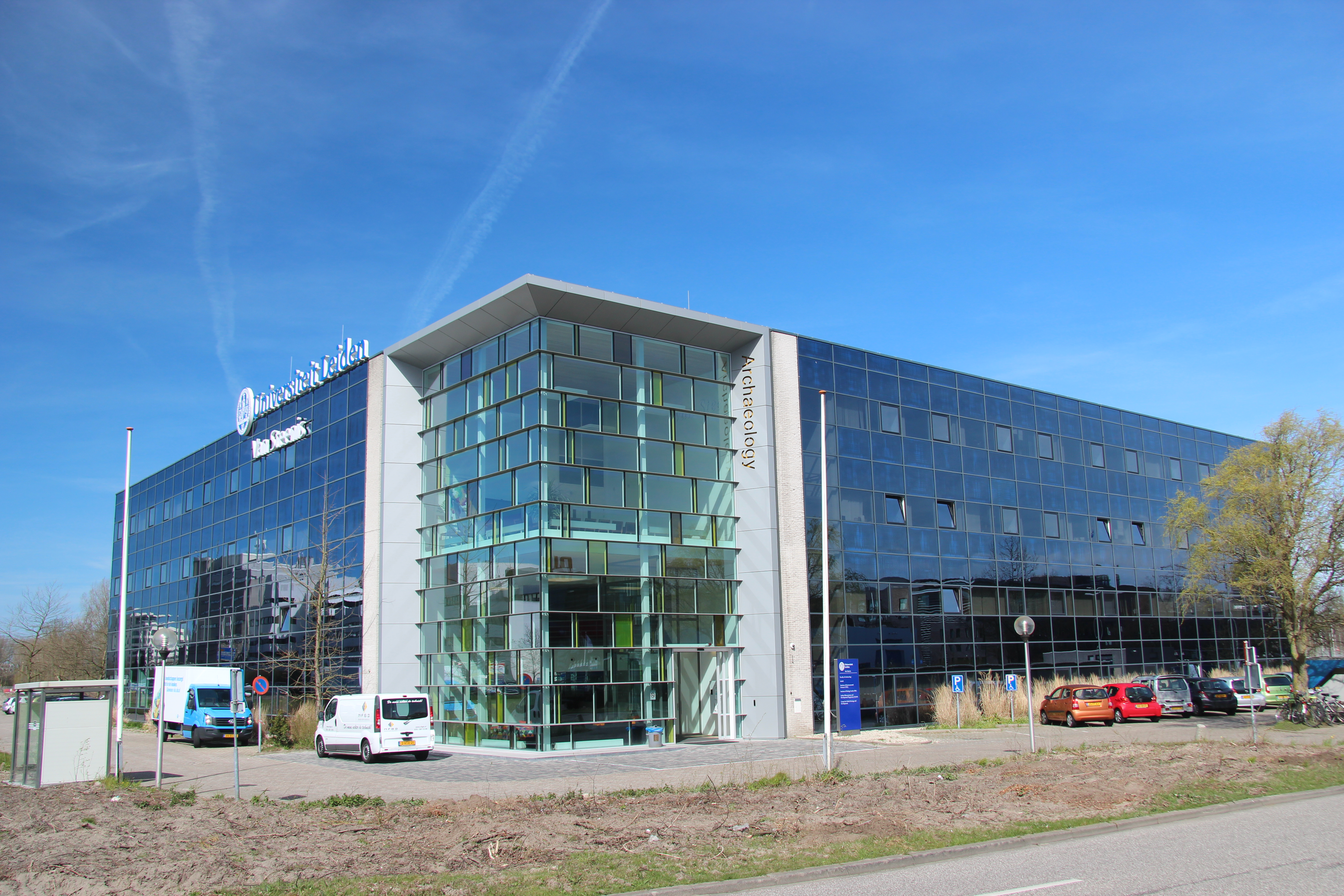 Universiteit Leiden, Van Steenis Gebouw, Einsteinweg 2, 2333 CC Leiden. Gevestigd in dit gebouw: Archeologie, Opleiding Biologie en Centrum voor Milieuwetenschappen (CML).